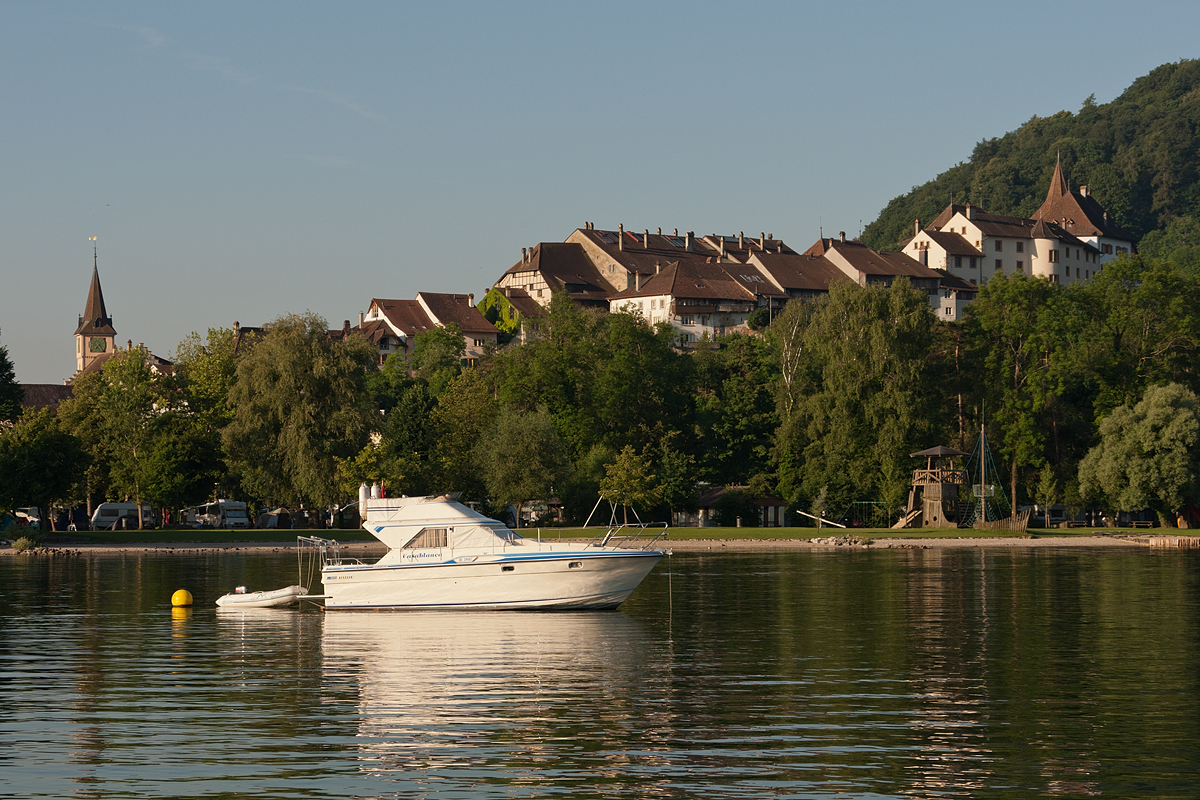 Erlach am Bielersee